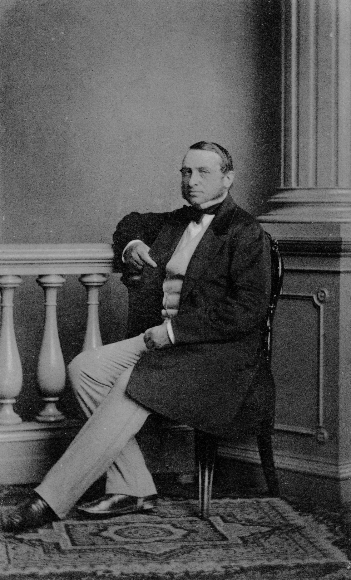 Theodor Merck (* 3. Oktober 1816 in Hamburg; † 21. November 1889 ebenda)[1] Theodor Merck bezog 1860 mit seiner Familie das Landhaus Rücker.